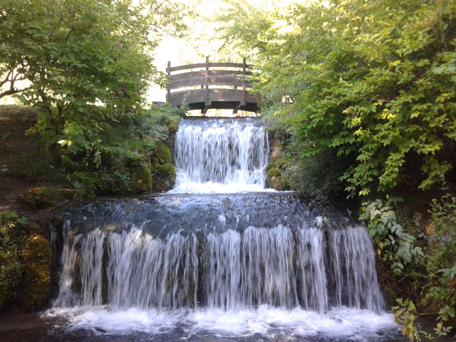 Il ponte sul torrente della Sponga